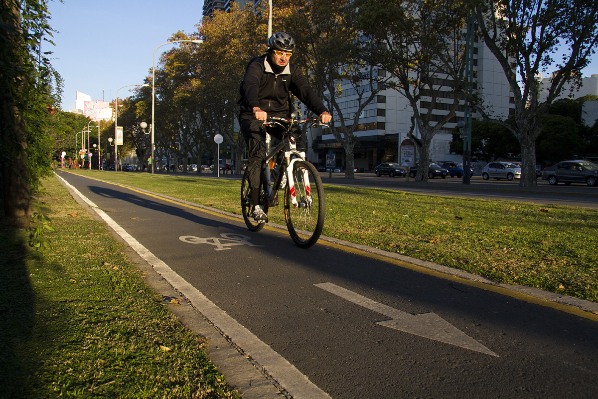 Foto: Estrella Herrera